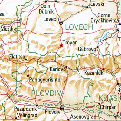 Trojan - Lage des Ortes in Bulgarien